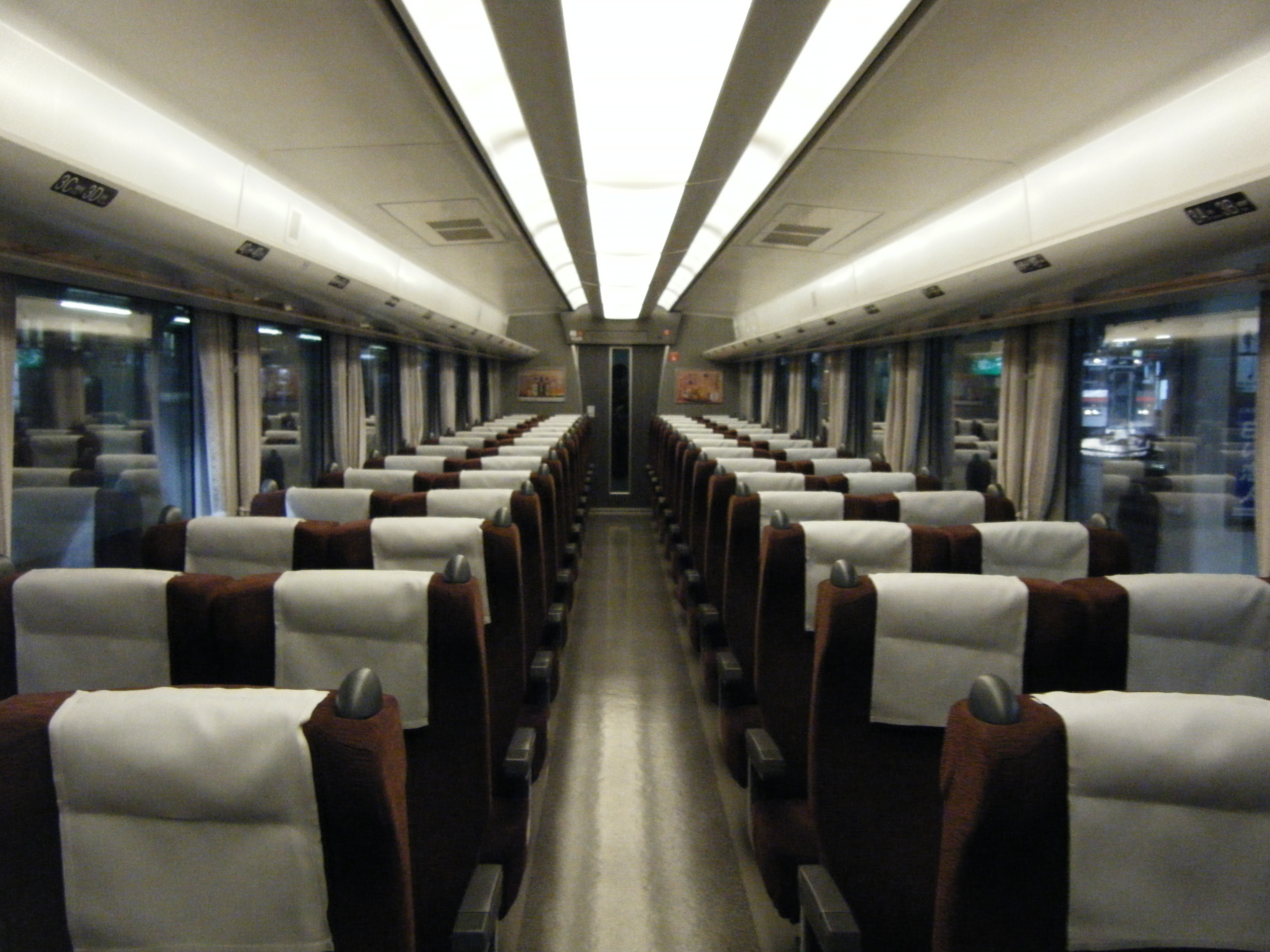 JR北海道785系車内 札幌駅停車中の車内にて